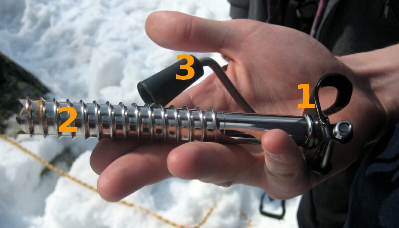 Broche à glace avec numéros pour Wikibooks (L'Alpinisme).